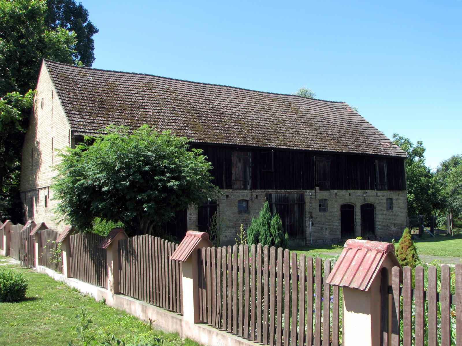 Wojcieszyce. Zabytkowa stodoła przy ul. Strzeleckiej